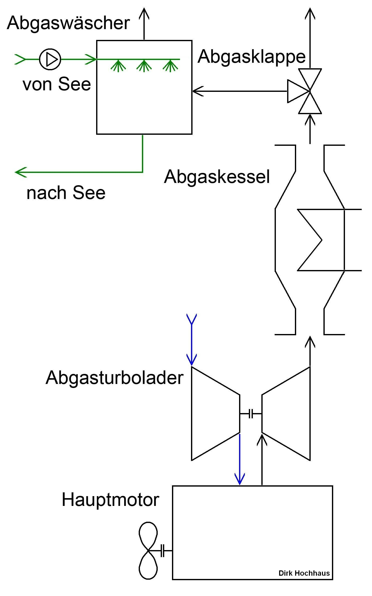 Schematische Darstellung einens einfache Systems zur Schwefelreinigung